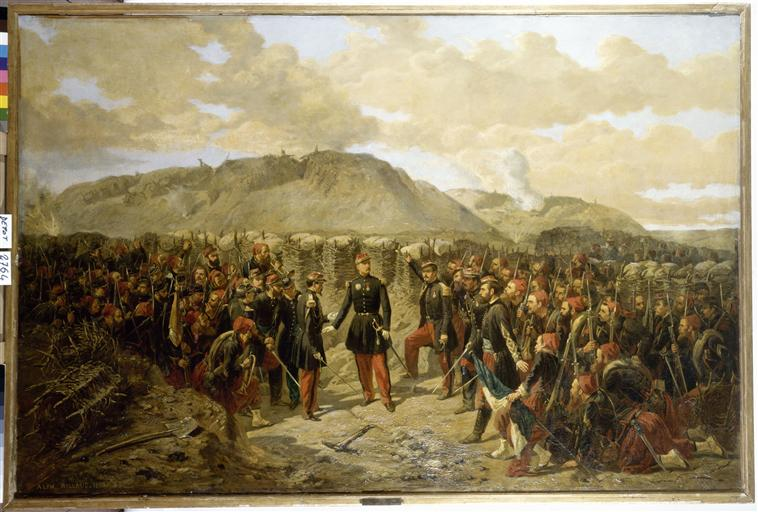 Le général MacMahon avec le 1er Zouaves avant l'attaque de Malakoff (par Alphonse Antoine Aillaud)